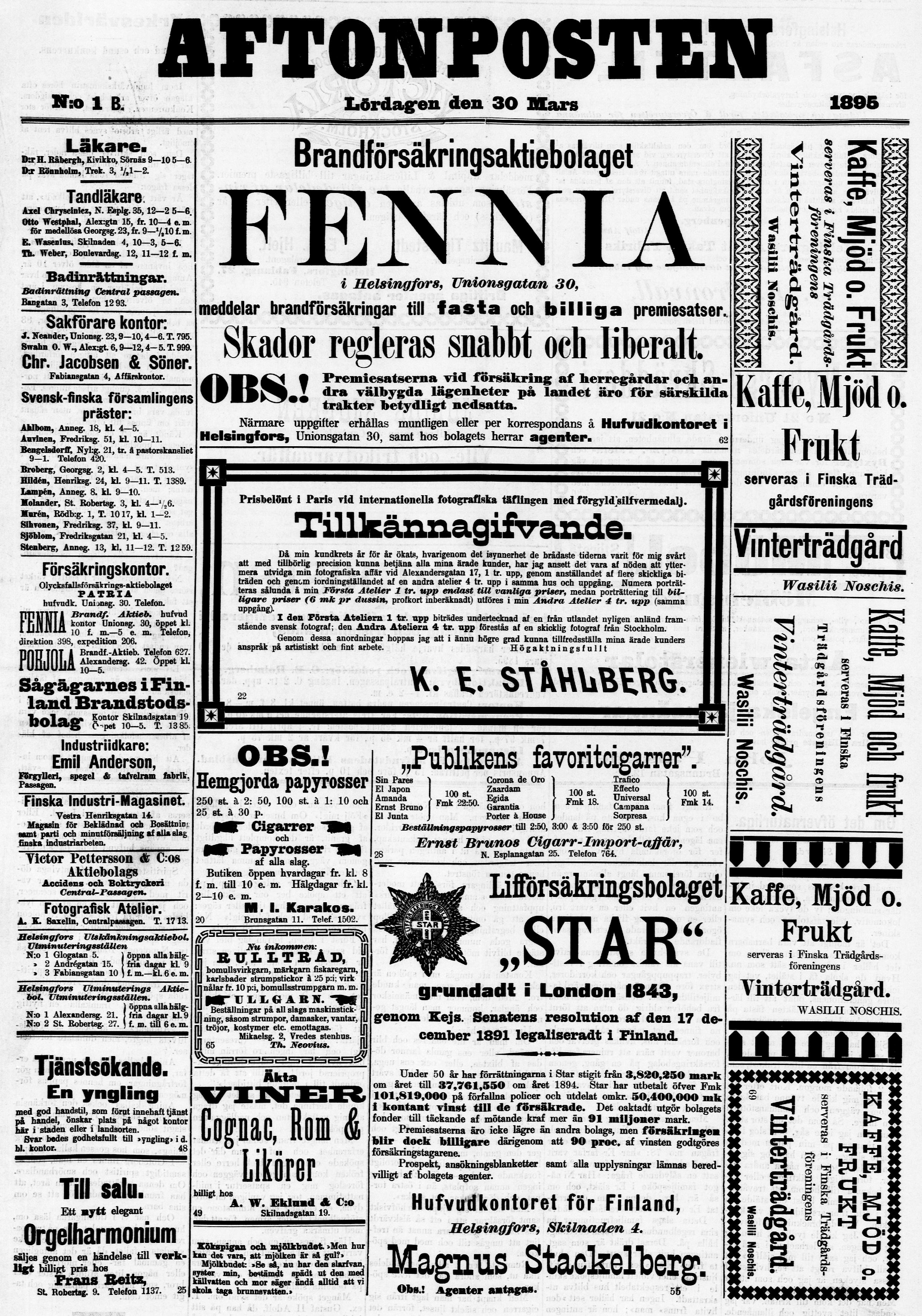 Första numret av Aftonposten, del B